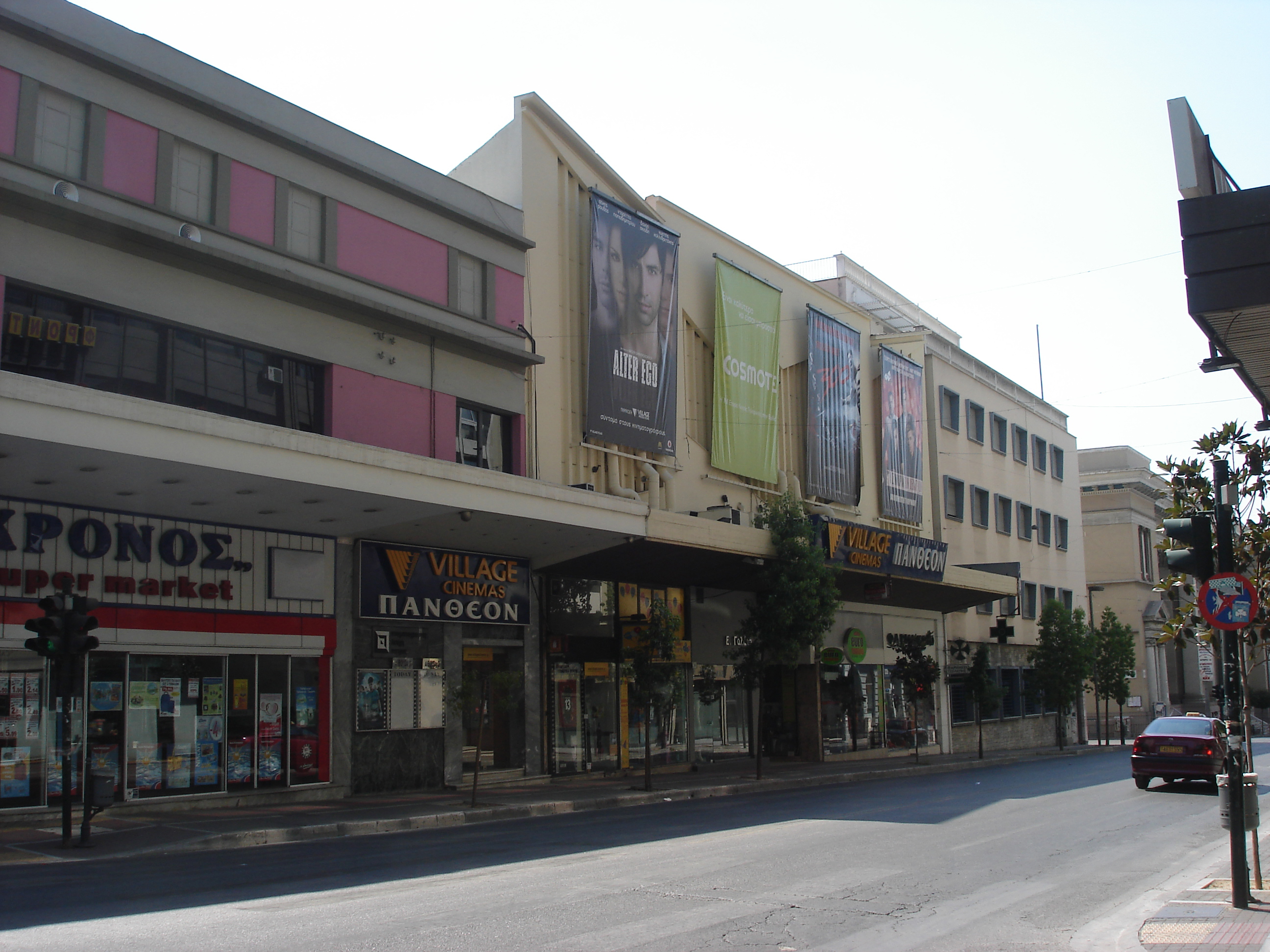 Cinema and Theatre Pantheon, Patra ,Achaea ,Greece Κινηματοθέατρο Πάνθεον Πάτρας